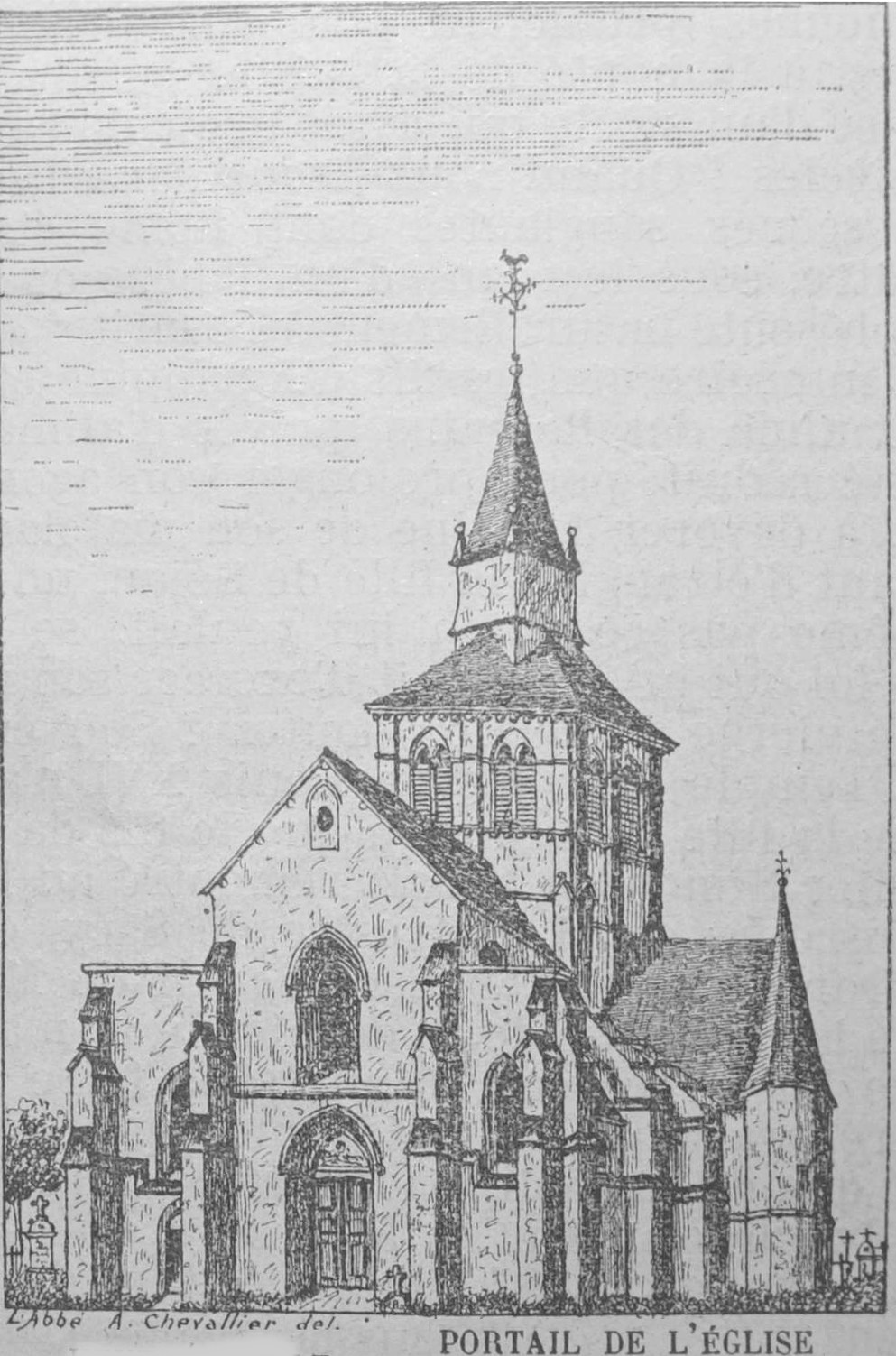 vue de l'aancienne église d' Heutrégiville dans l'almanach Matot-Braine de 1910.